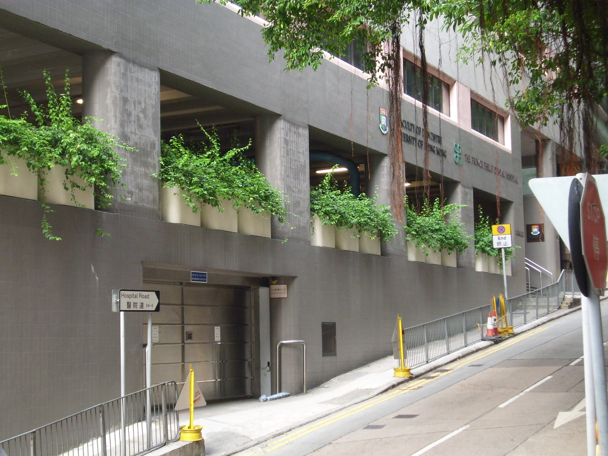 hospital street in HK